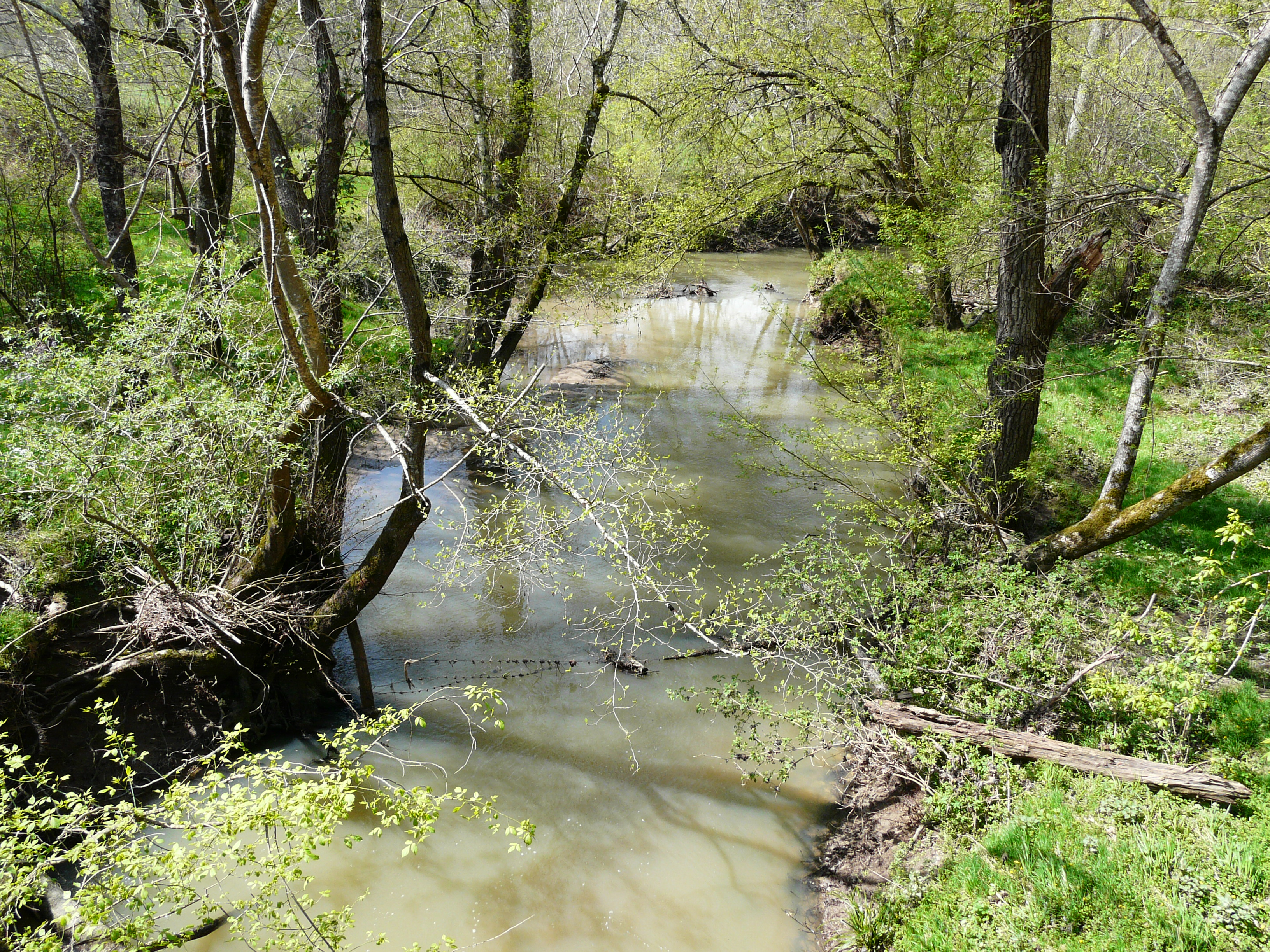 La Lidoire en aval du pont de la route départementale 10 entre Bonneville-et-Saint-Avit-de-Fumadières (à gauche) et Montpeyroux (à droite), Dordogne, France.